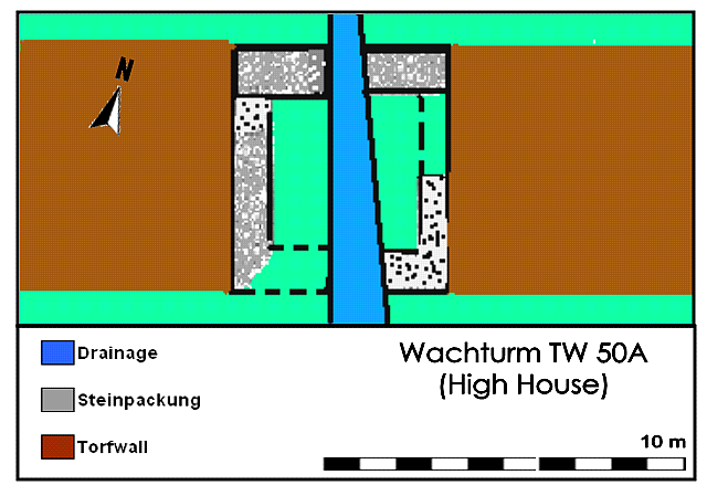 Befundskizze Wachturm 50A (TW) High House, Hadrianswall, 2. Jahrhundert n.Chr.